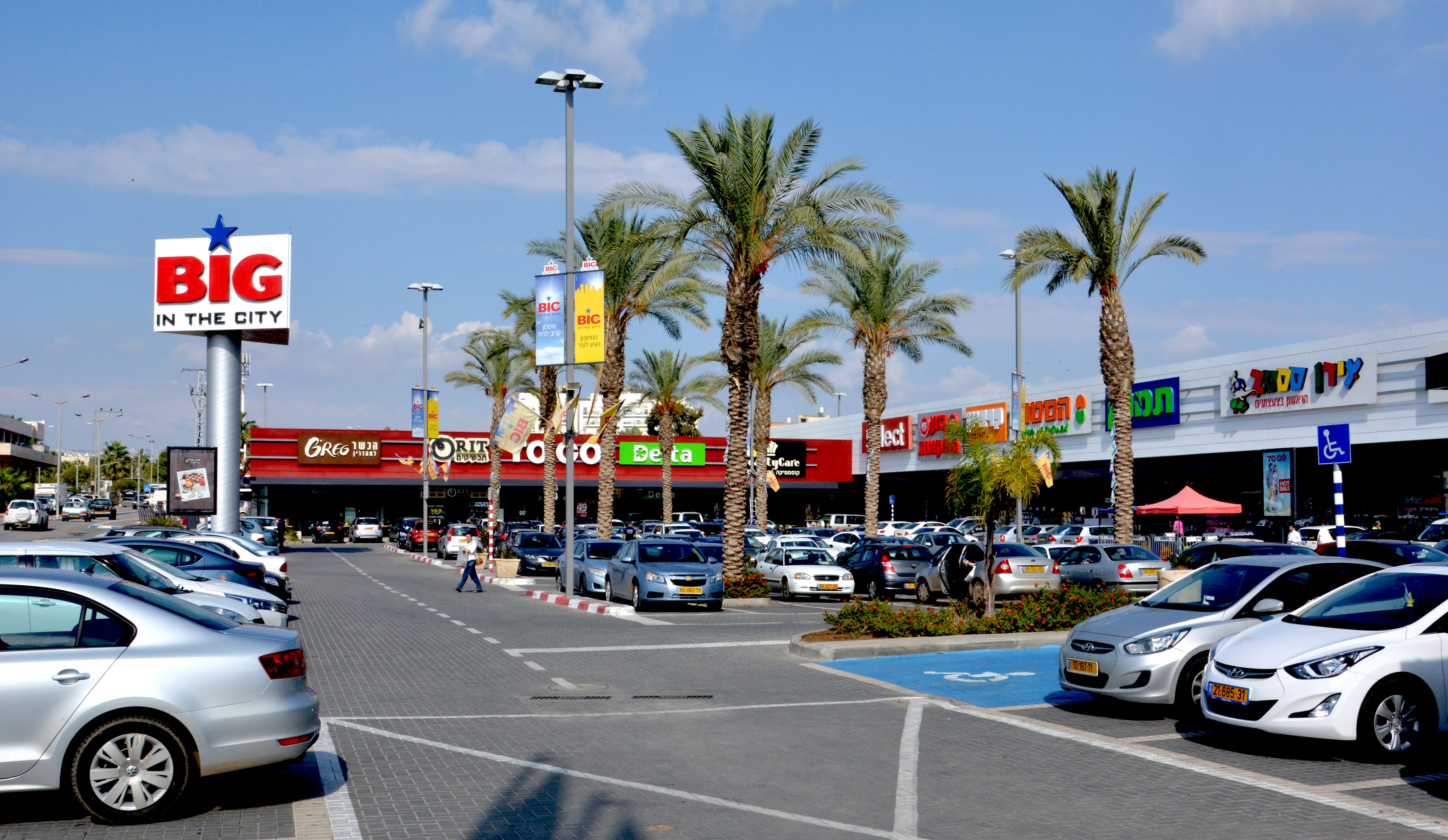 ביג